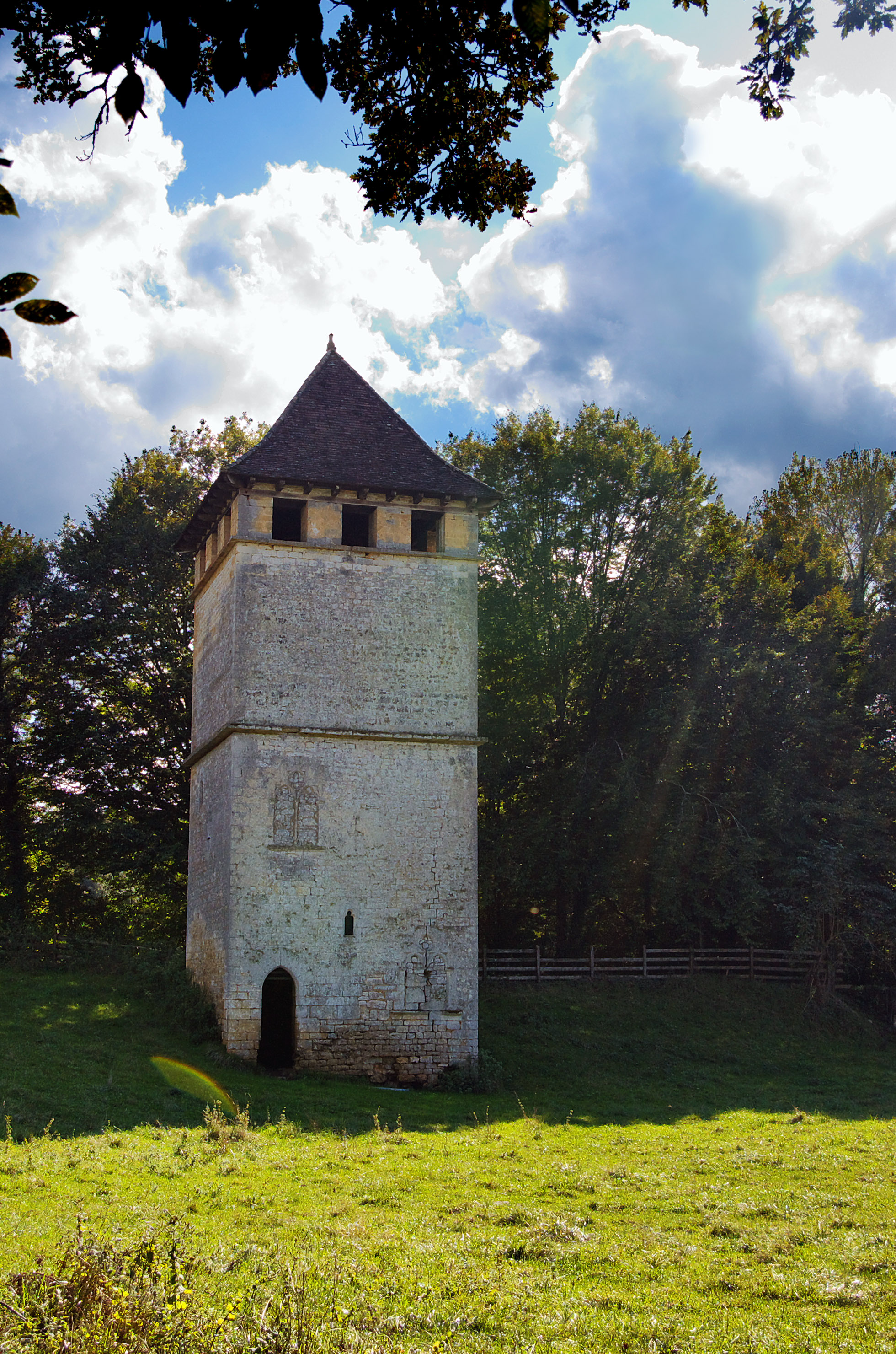 Tour-pigeonnier de Labio